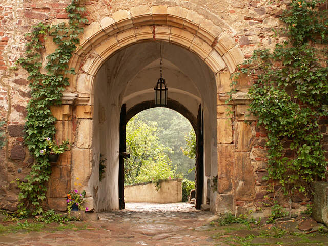 Eingangsportal vom Hof des Schlosses Scharfenberg bei Meißen